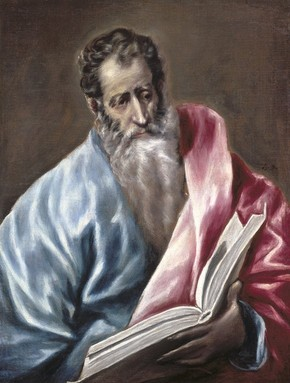 St Matthew El Greco